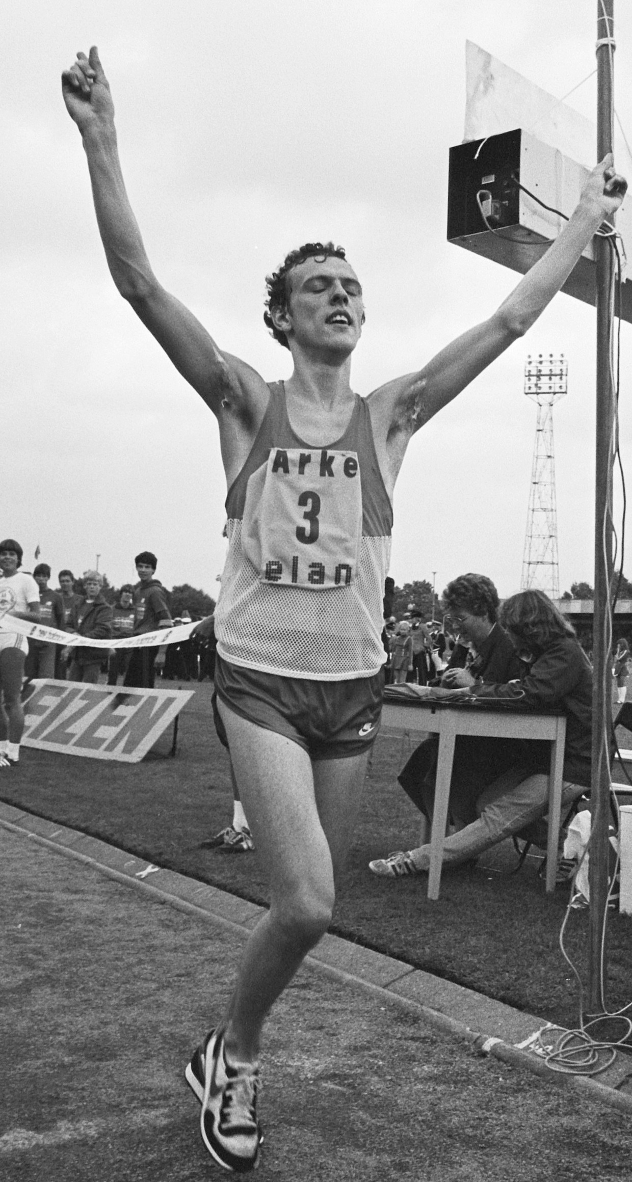 Winnaar Kevin Forster finisht